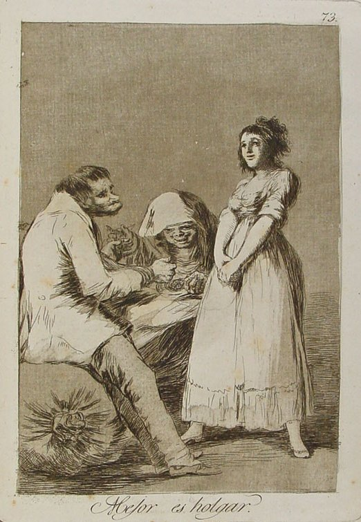 Capricho nº 73: Mejor es holgar de Goya, serie Los Caprichos